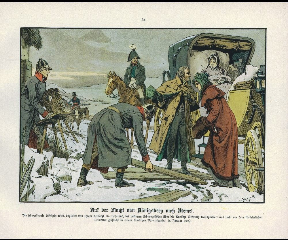 "Die Königin Luise in 50 Bildern für Jung und Alt", Verlag Paul Kittel, Berlin 1896. "Auf der Flucht von Königsberg nach Memel"